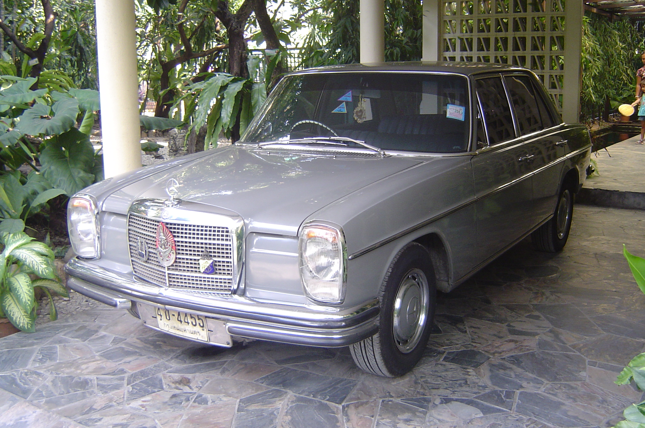 MB250 /8